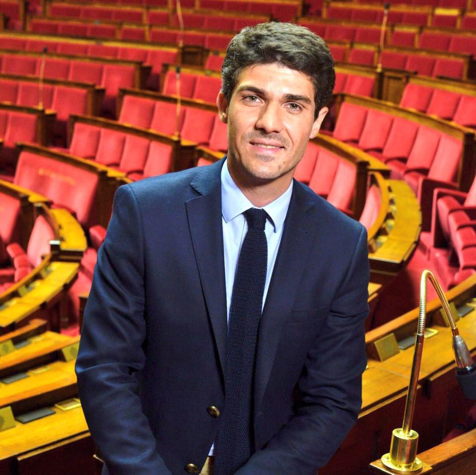 Aurélien Pradié le mardi 11 juillet 2017 dans l'hémicycle de l'Assemblée nationale.